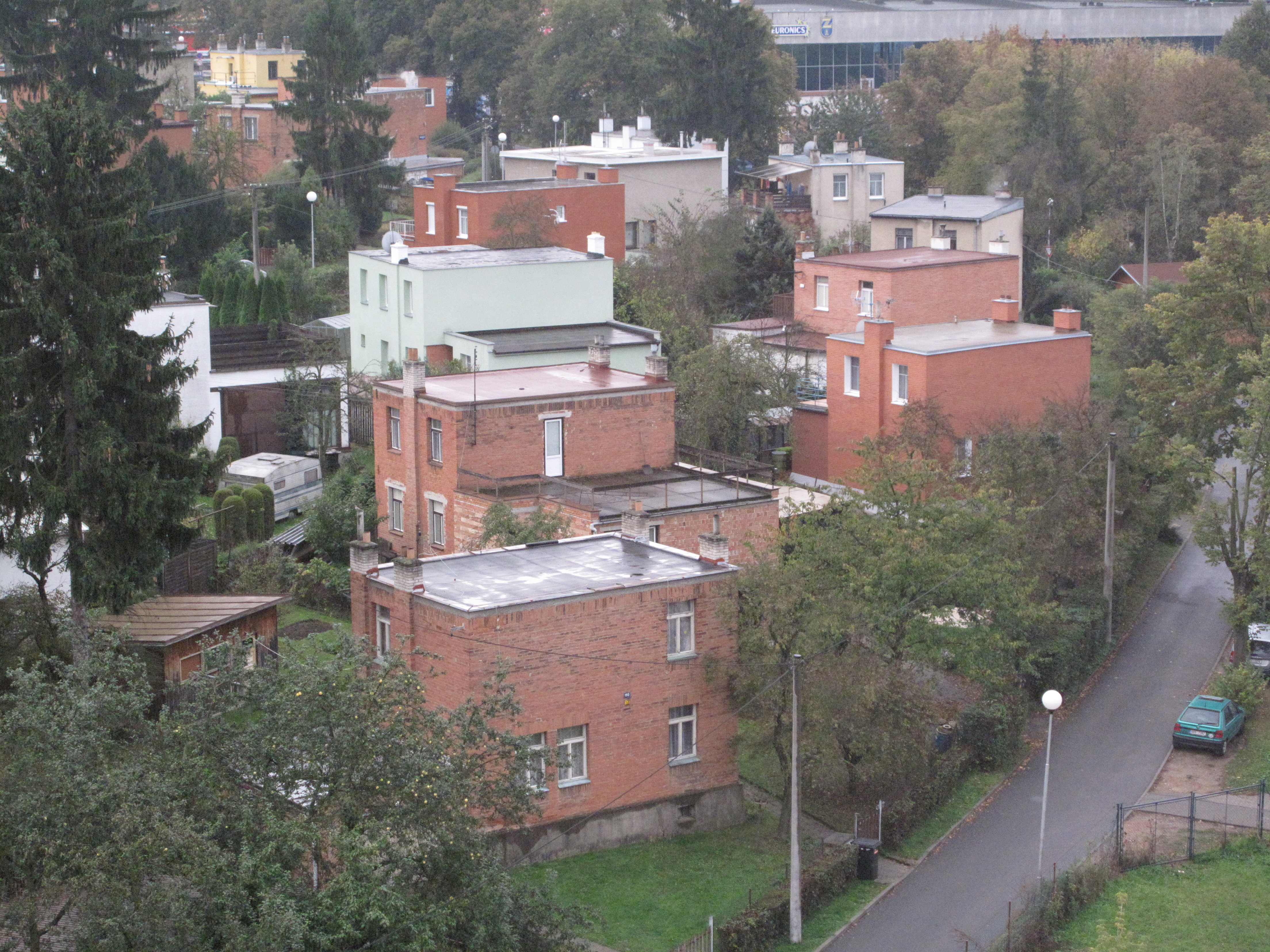 Zlín